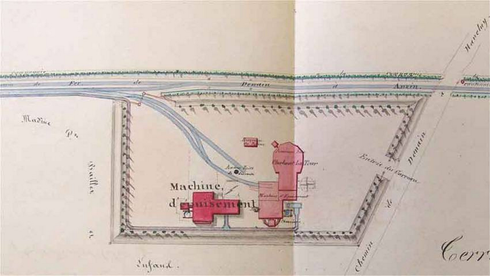 La fosse Chabaud-Latour de la Compagnie des mines d'Anzin était un charbonnage constitué de deux puits situé à Denain, Nord, Nord-Pas-de-Calais, France.